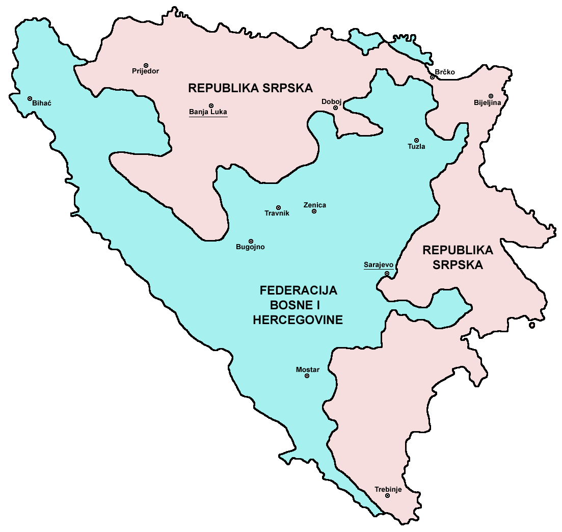 Political division of Bosnia and Herzegovina in 1995, after Dayton Agreement.Politička podela Bosne i Hercegovine 1995. godine, posle Dejtonskog sporazuma.